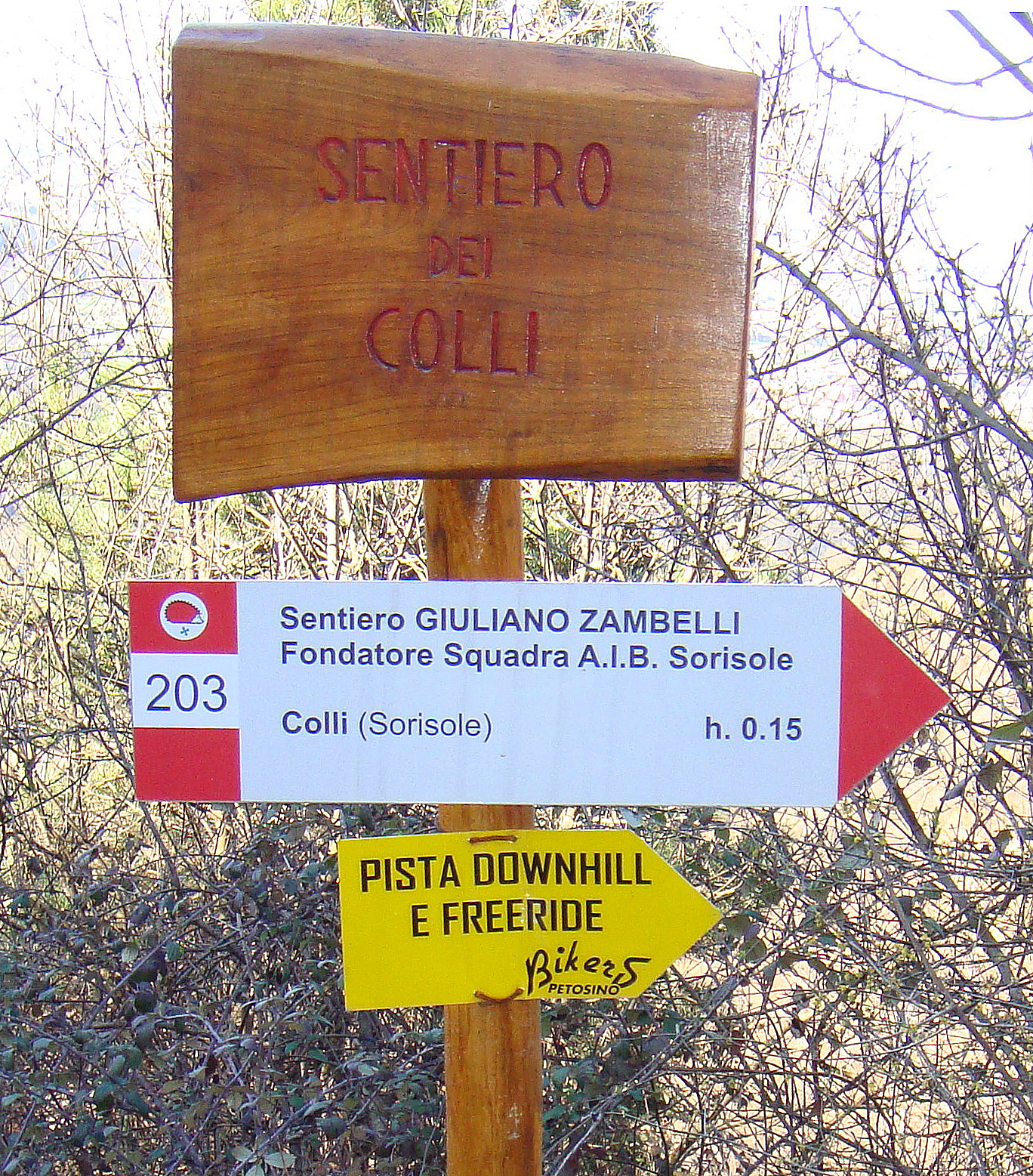 segnaletica sentiero Parco dei Colli